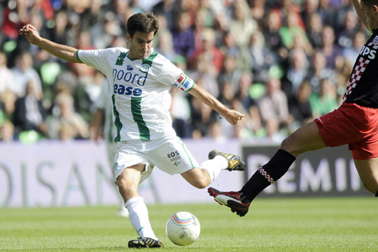 Koen van de Laak